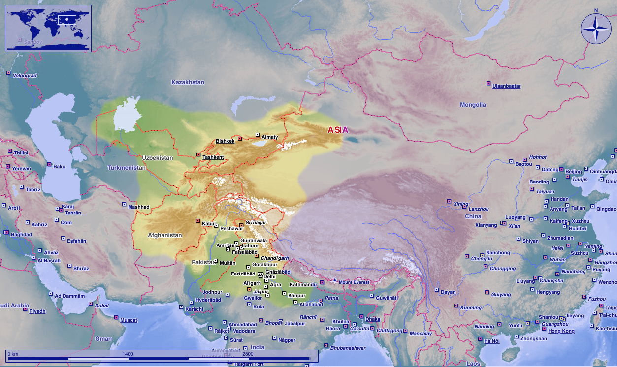 A heftaliták által uralt területek 520 körül. A területeken az általunk besenyőknek nevezett nép is élhetett, akiken heftaliták[2] uralkodtak. A heftaliták által uralt területek 520 körül.